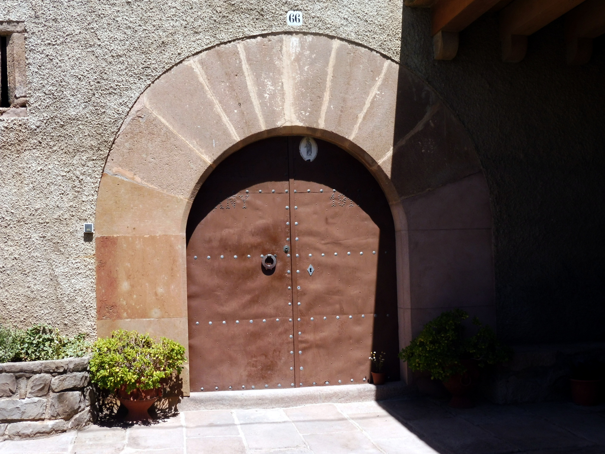 Mas el Sunyer de Valldeperes (Navàs): Portal